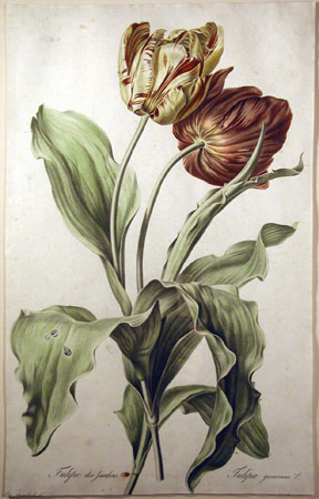 "Tulipe des jardins" ("Garden tulip"), plate from "Fleurs dessinées d'après nature" by Flemish-born painter Gerard Van Spaendonck.